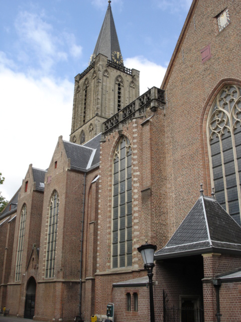 Jacobikerk Utrecht